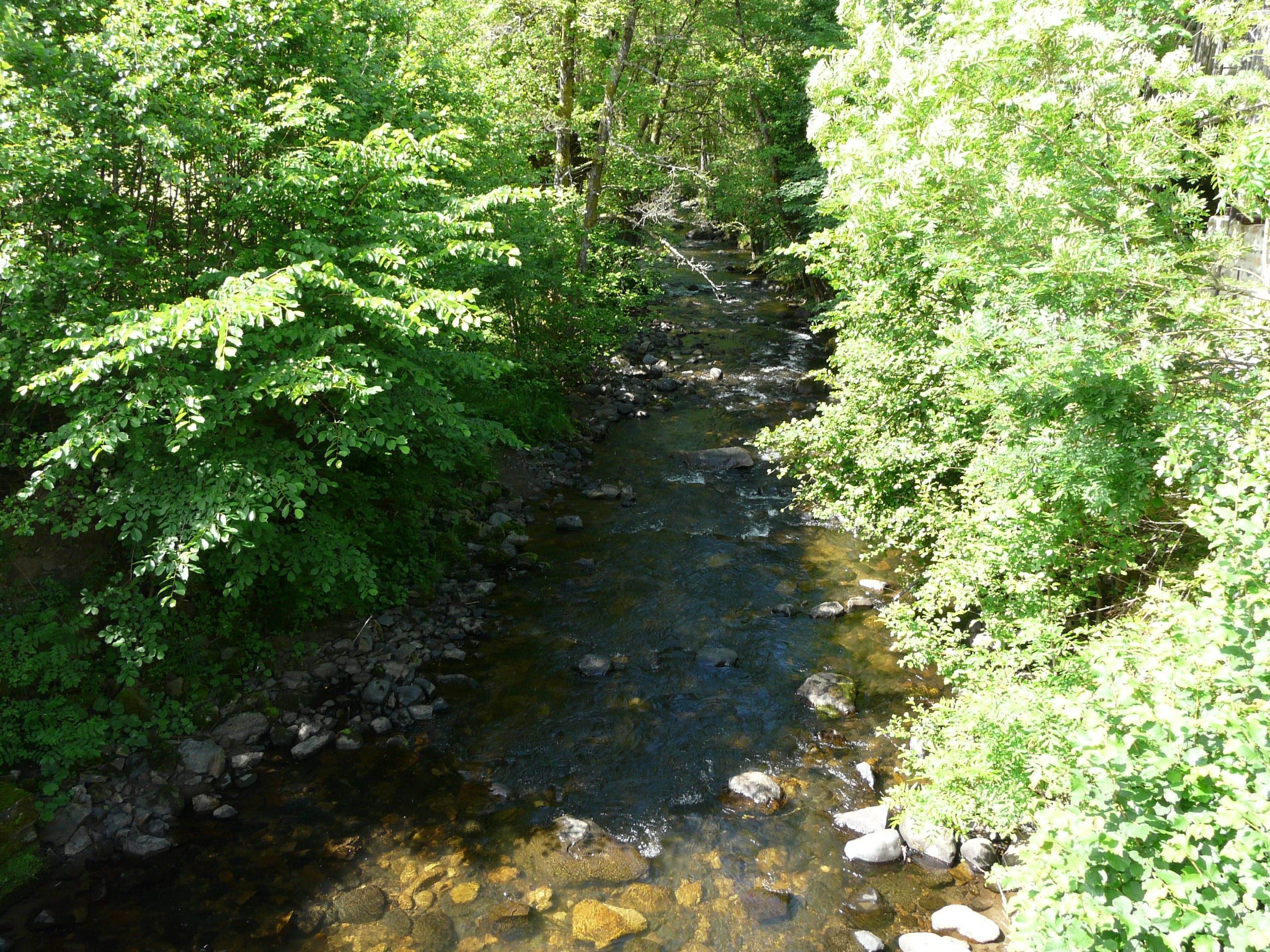 La Trentaine en aval du pont de la route départementale 88, Saint-Donat, Puy-de-Dôme, France.